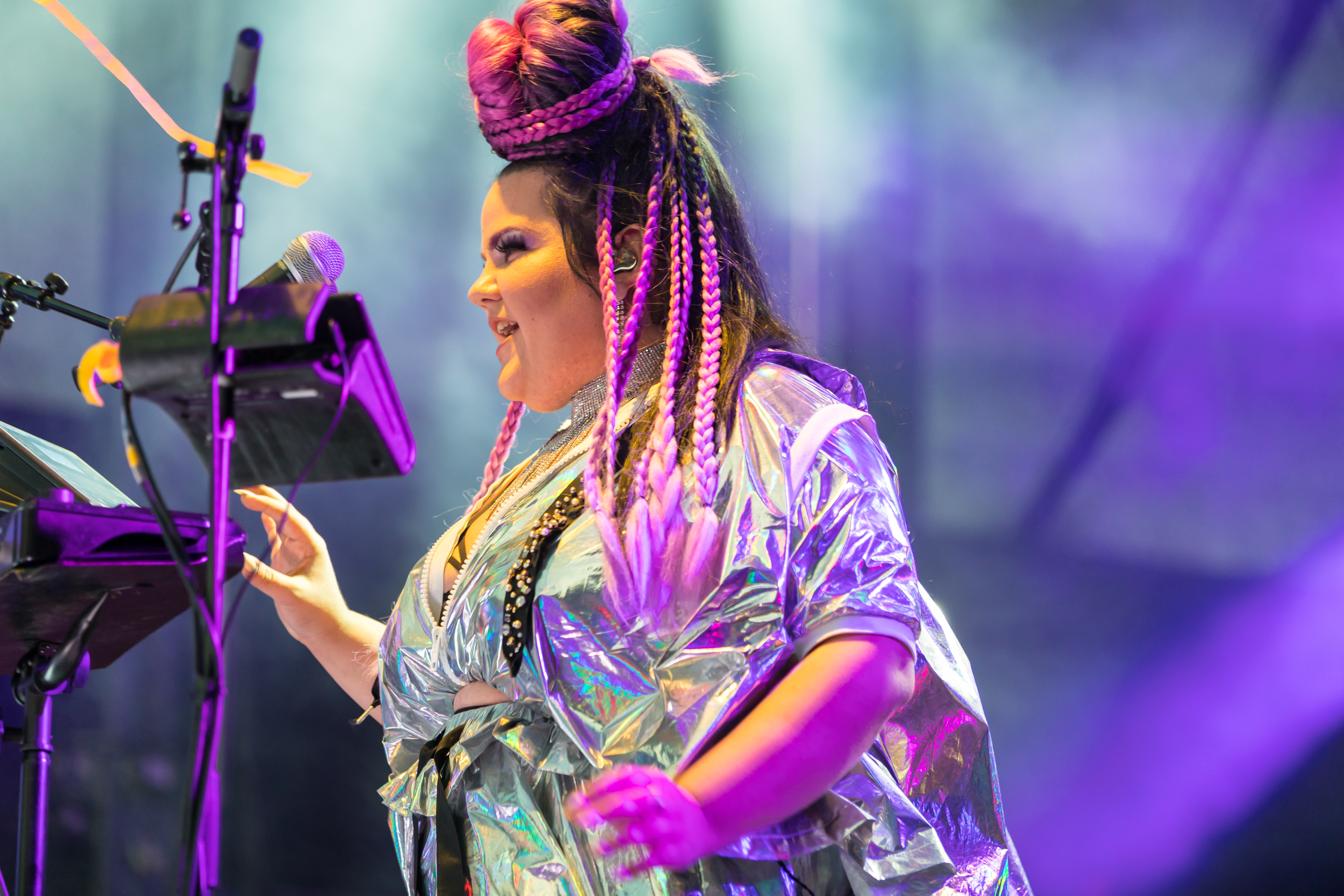 ColognePride/CSD 2018 - Auftritt von Netta Barzilai auf der Hauptbühne, Heumarkt